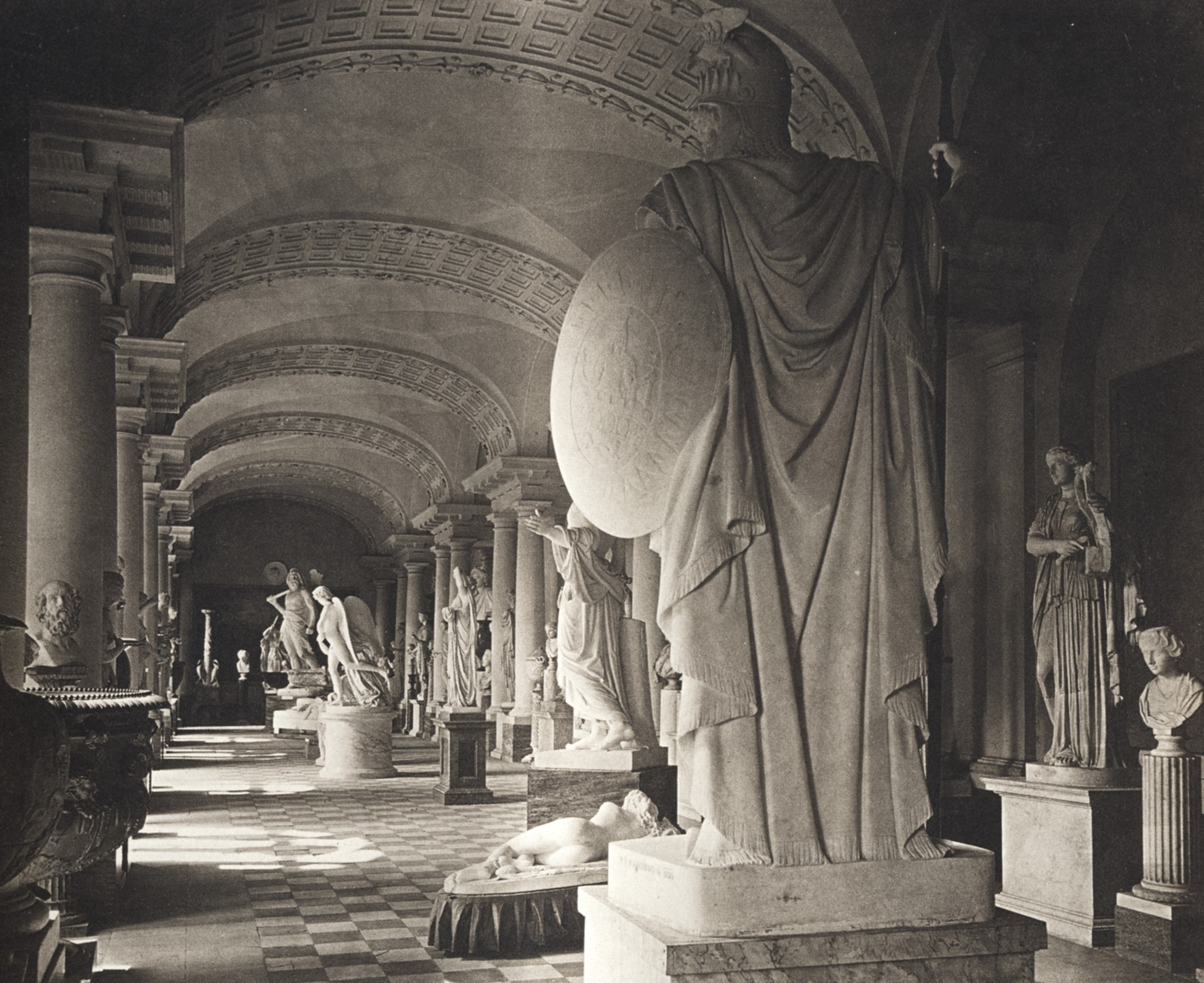 Gustav III:s skulptursamling, senara Gustav III:s antikmuseum på Stockholms slott